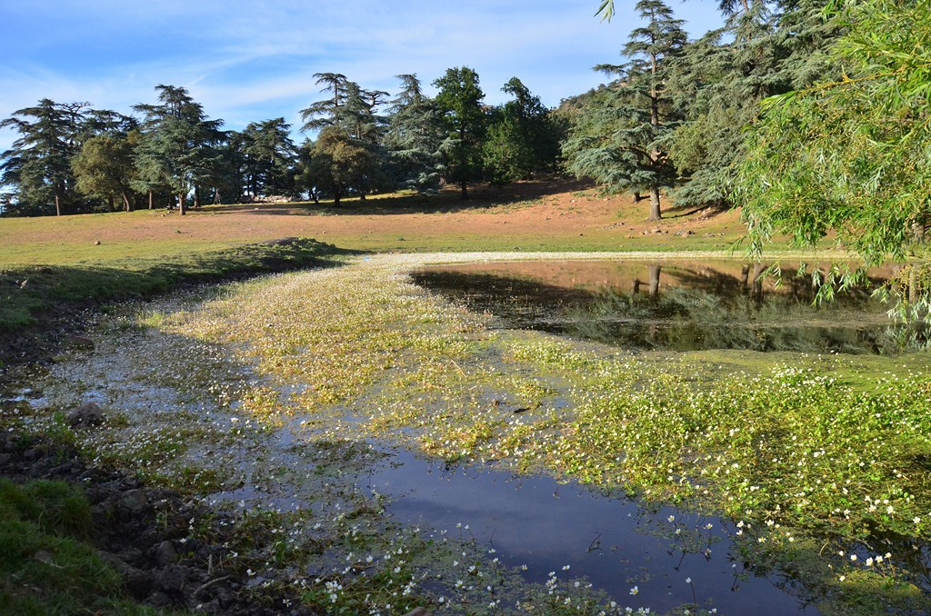 le parc national de la foret des cèdres de Theniet el had Algerie